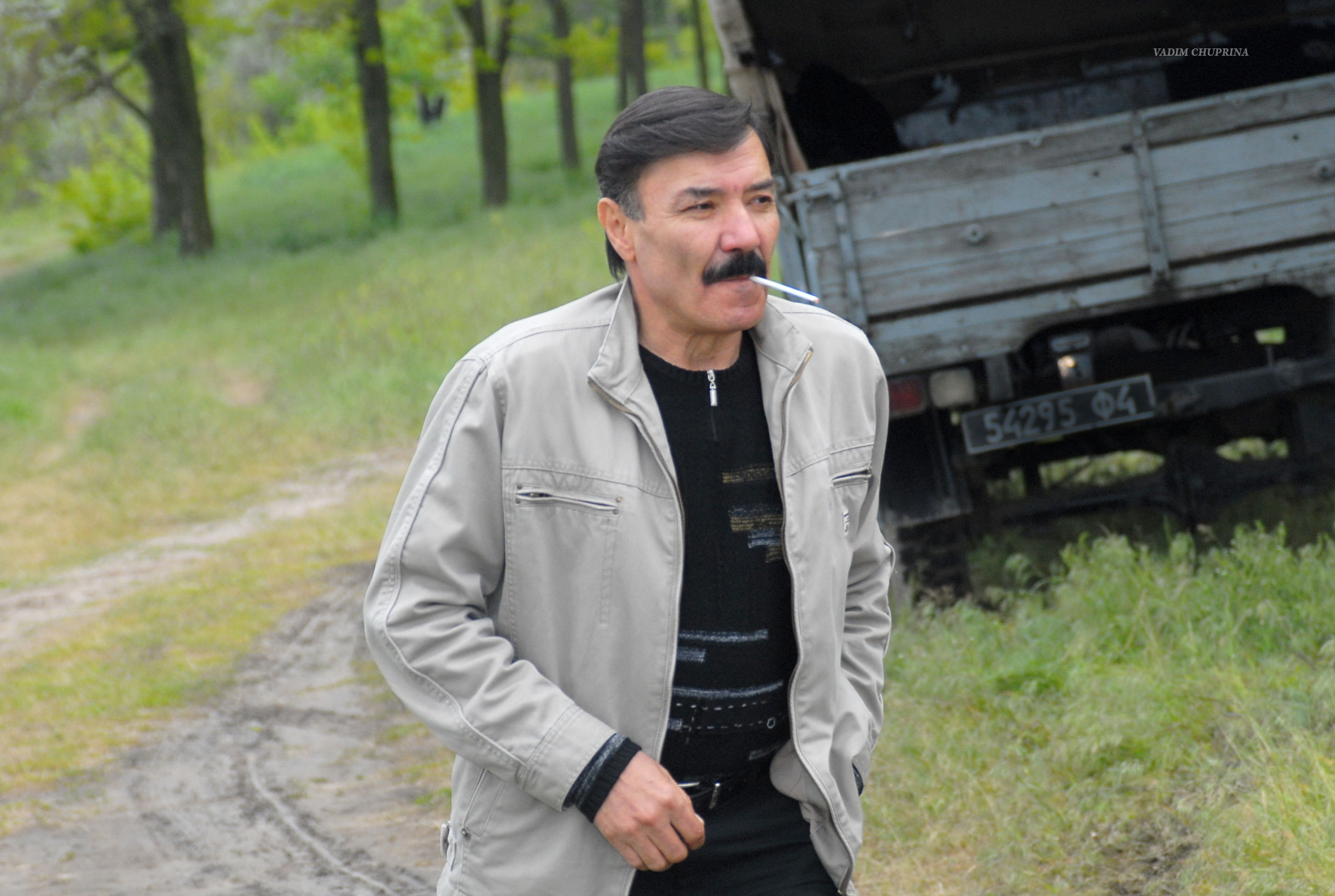 Сагдуллаев, Рустам Абдуллаевич , фото Чуприна Вадим